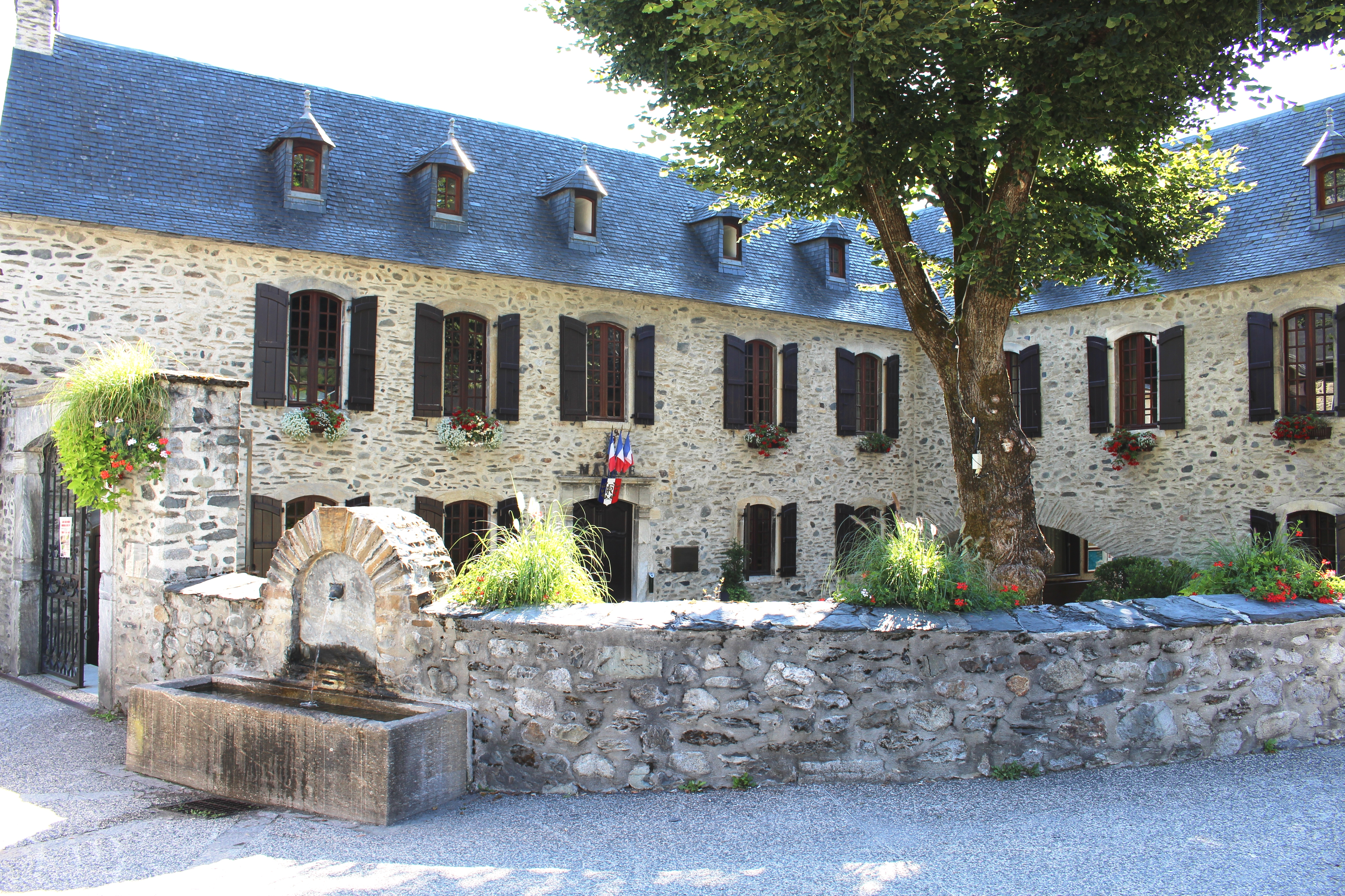 Mairie de Saint-Lary-Soulan (Hautes-Pyrénées)